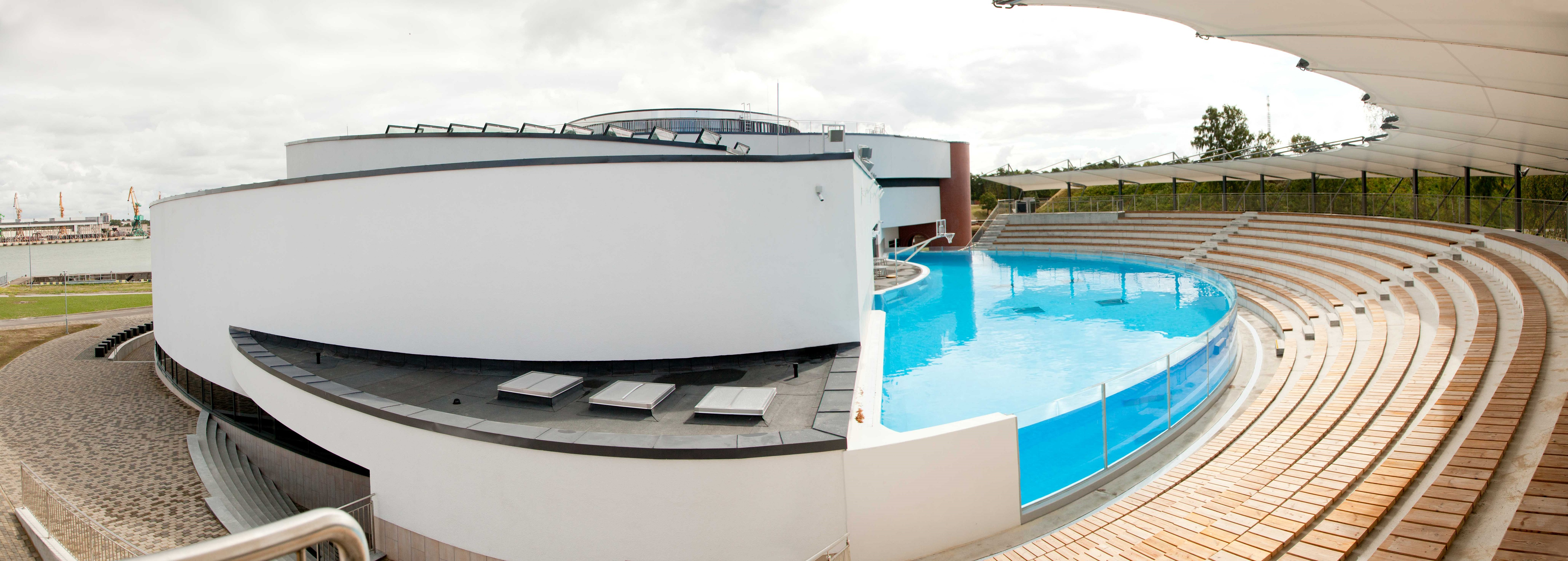 Fotografas: Alfonsas Mažūnas